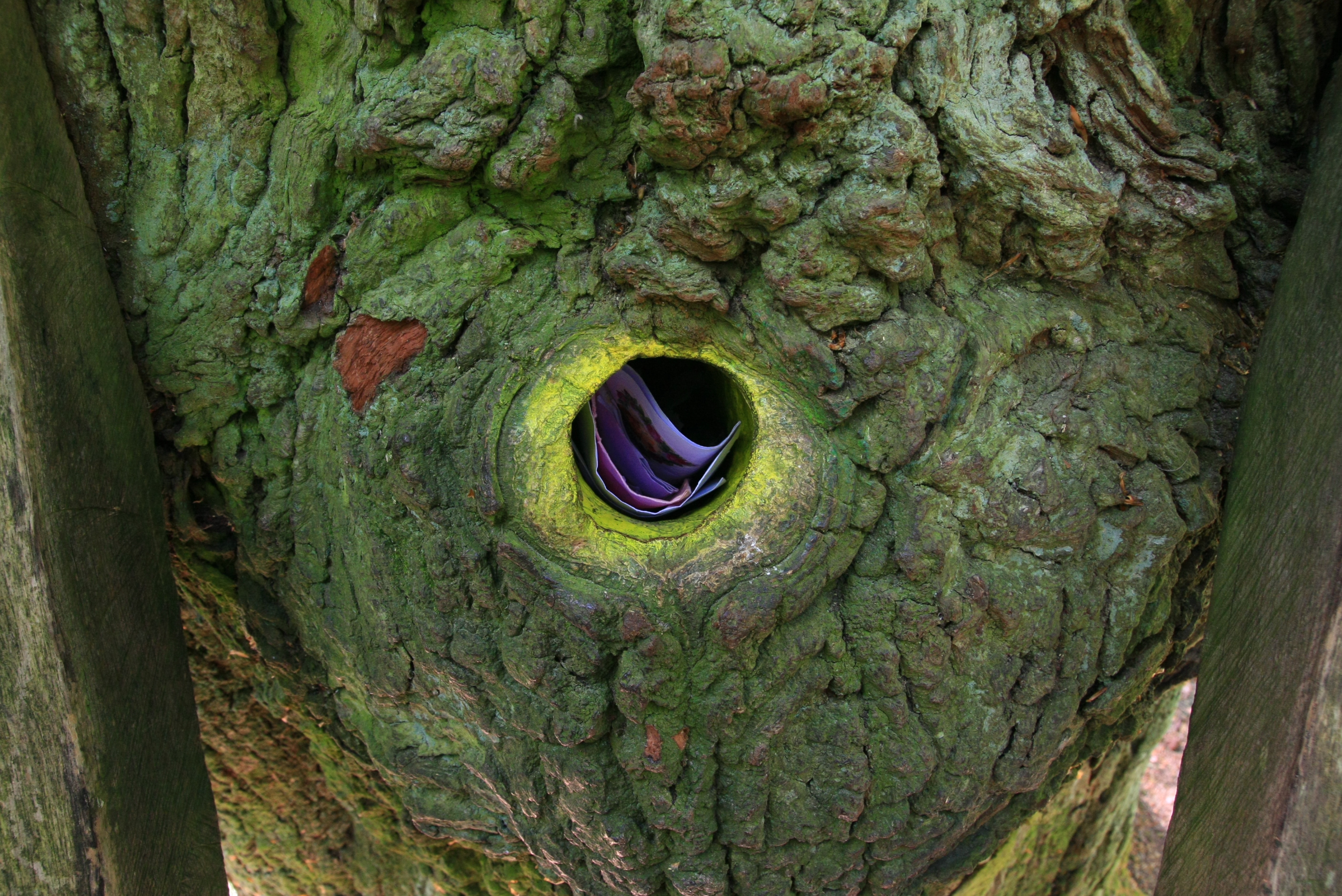 Briefkasten der Eutiner Bräutigamseiche im Dodauer Forst